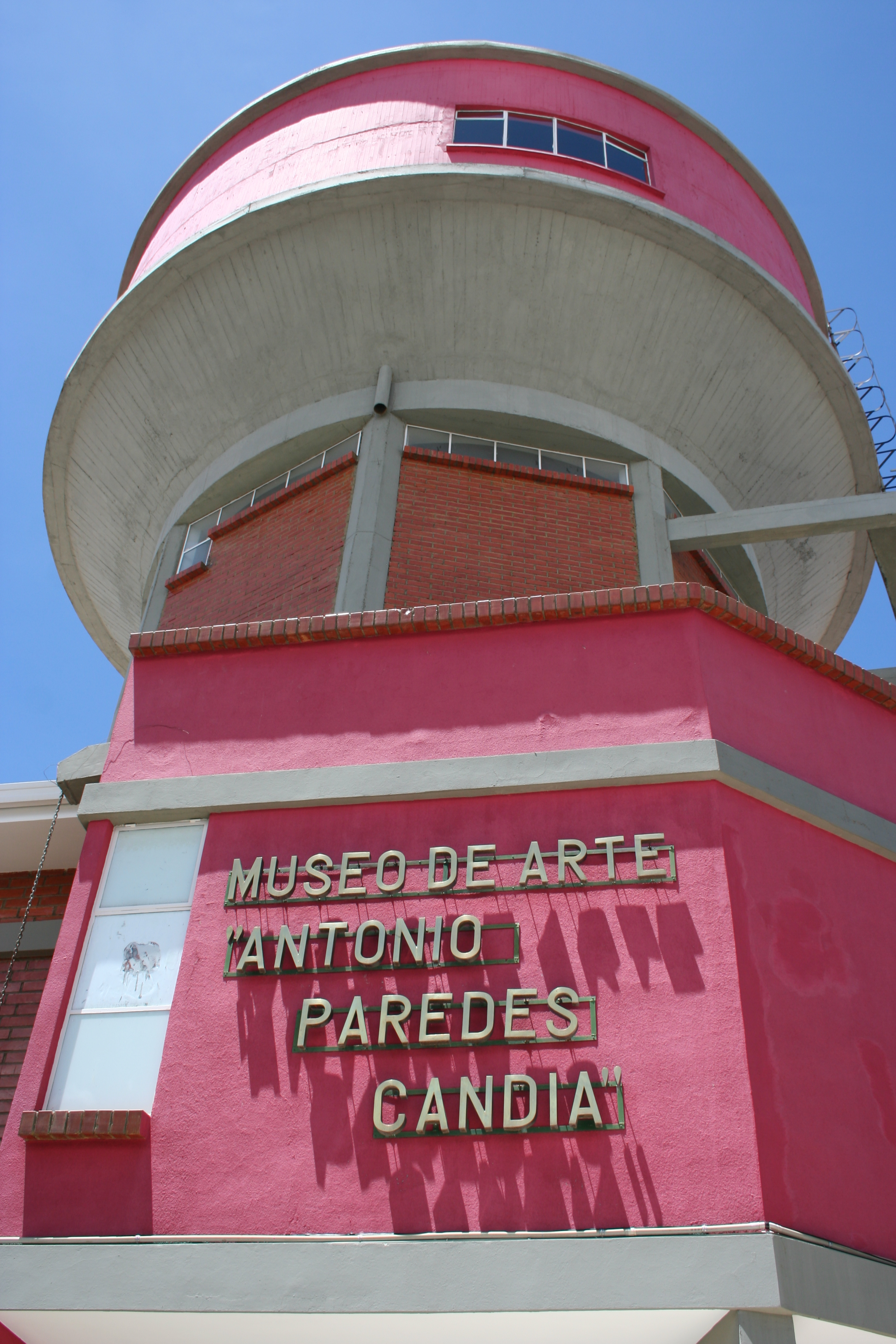 FACHADA PRINCIPAL DEL MUSEO CONTEMPORANEO ANTONIO PAREDES CANDIA